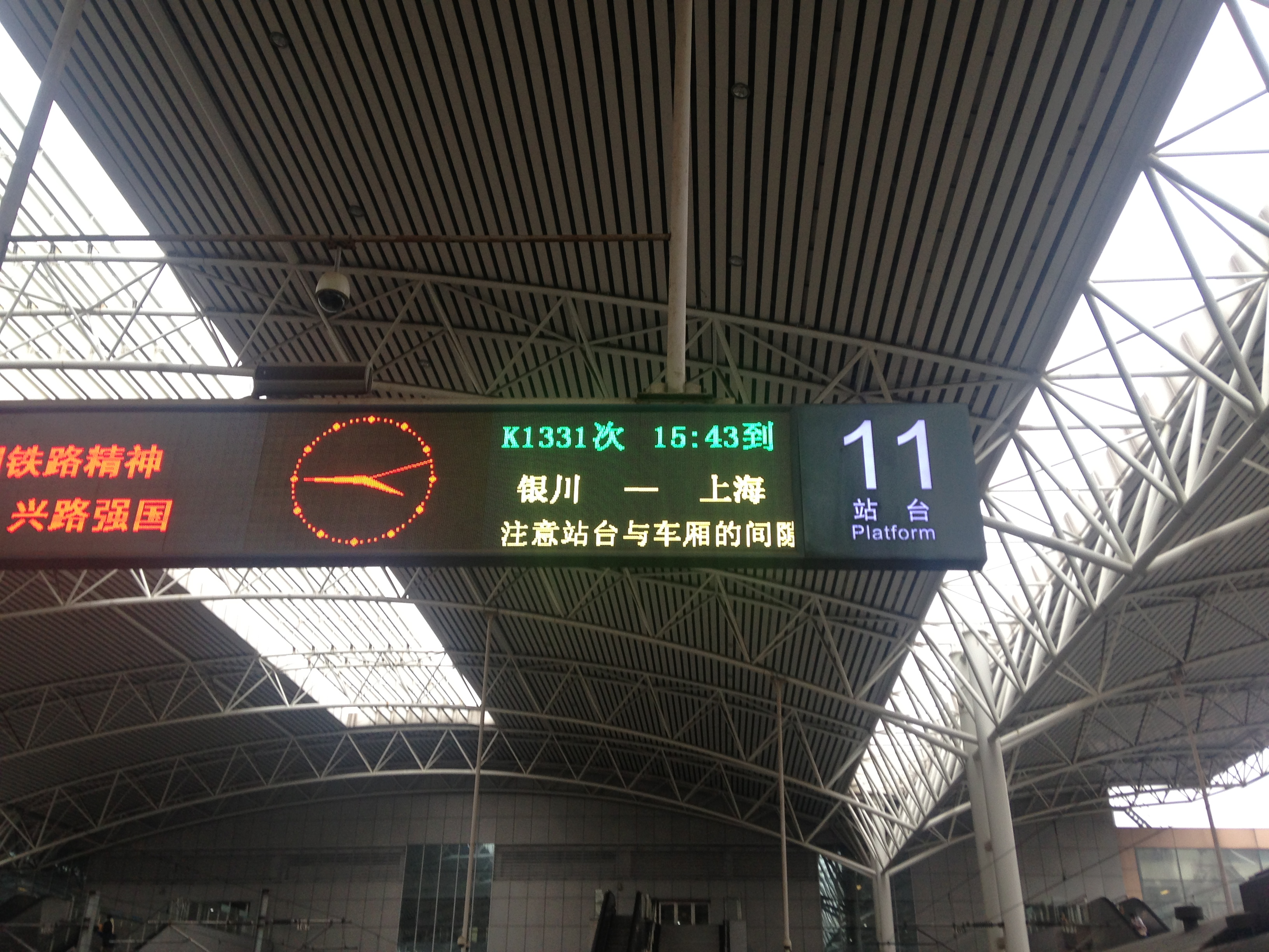 K1331次列车提前8分钟到达上海站。